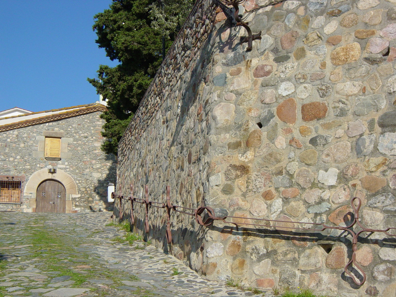 Muralla de Sant Pere de Vilamajor